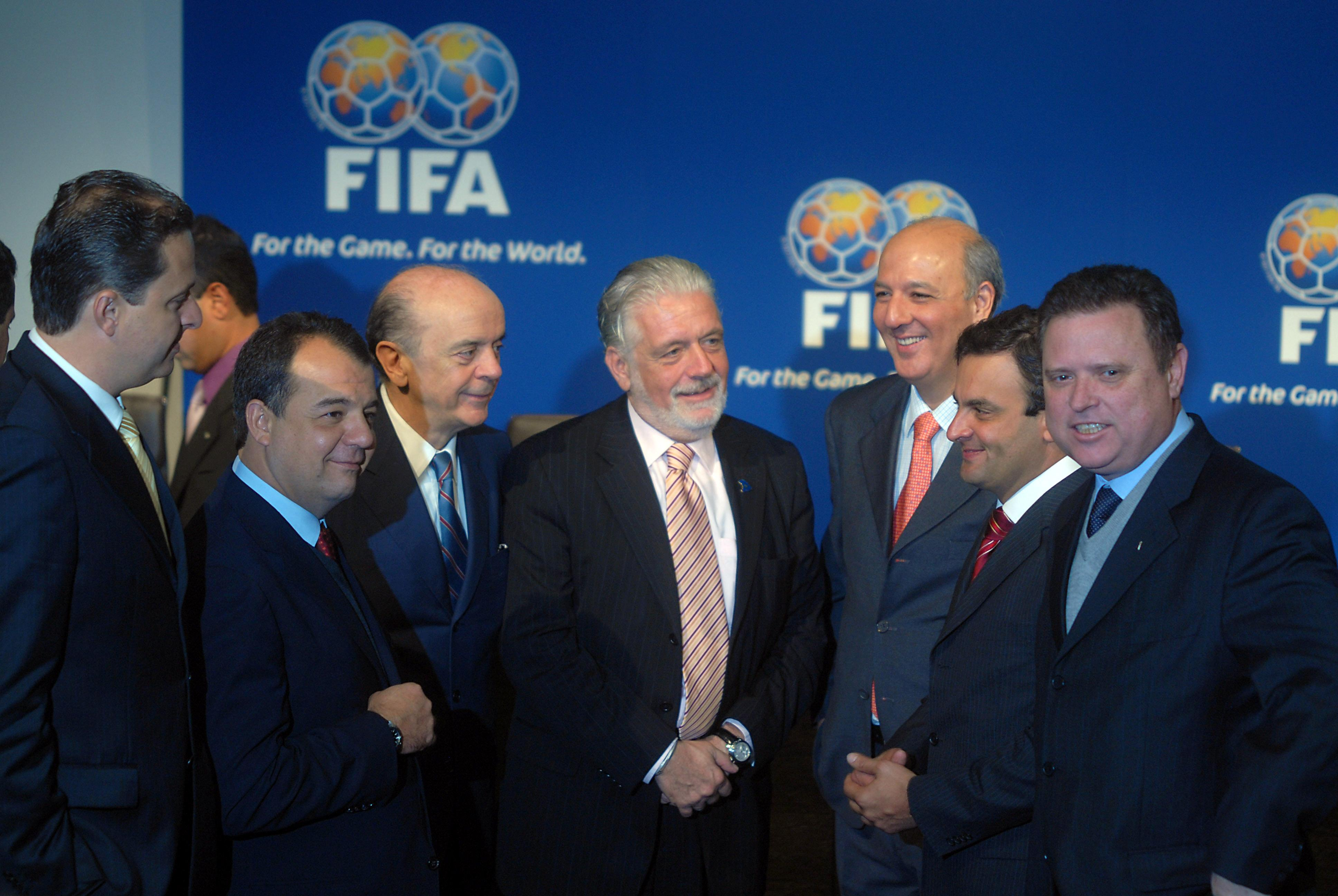 Zurique (Suíça) - Governadores de estados que pretendem sediar jogos da copa do mundo de 2014, na cerimônia de apresentação oficial da candidatura do Brasil como país sede do mundial.